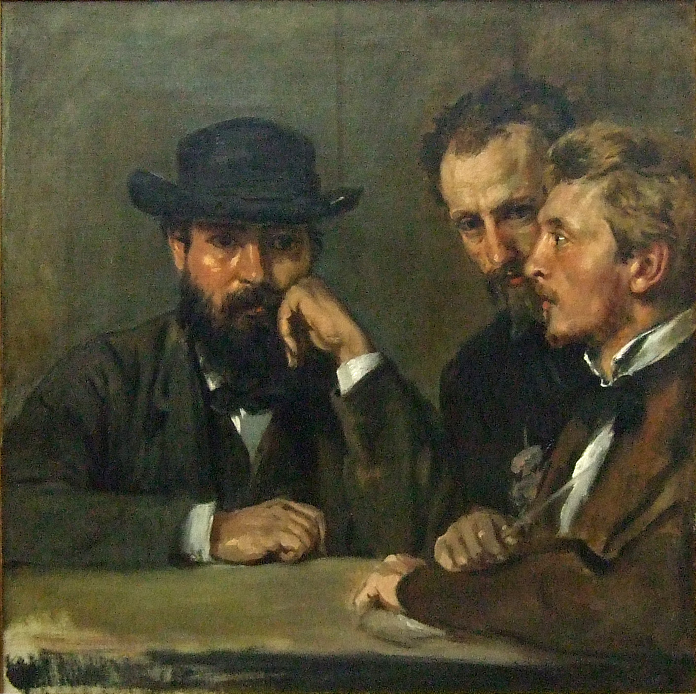 Selbstbildnis mit Hildebrand und Grant